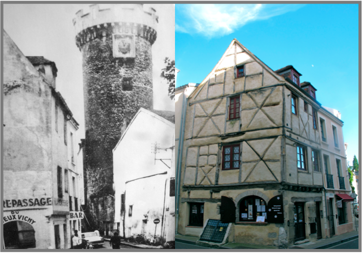 Au 16, rue d'Allier cette maison très bien conservée était celle du sonneur de cloche de l'ancienne tour du Moyen Âge effondrée en 1987. Pendant la dernière guerre et jusque dans les années 60, cette maison était un café-blanchisserie... ©2012